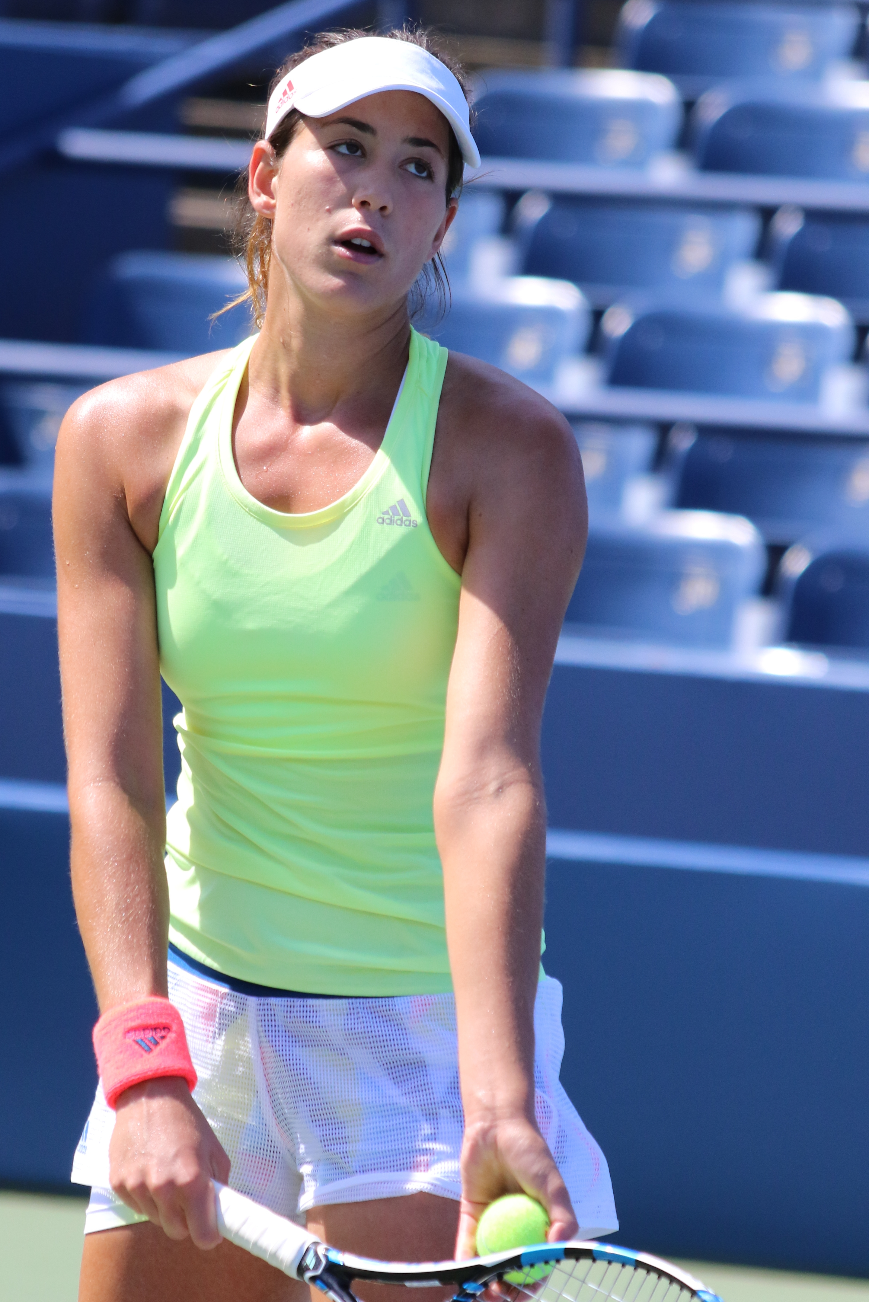 Muguruza US16 (6)